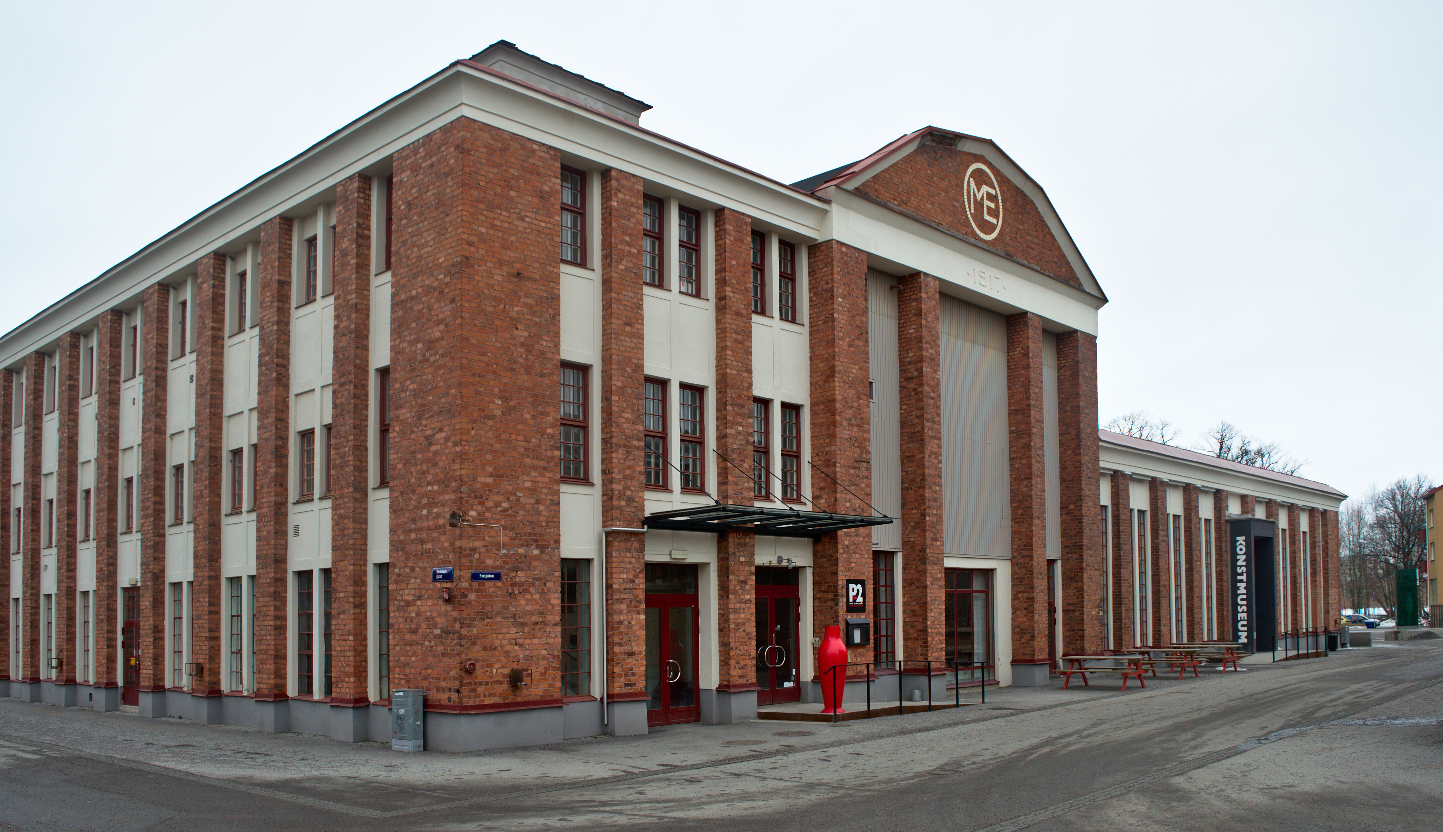 Eskilstuna konstmuseum - utsida.